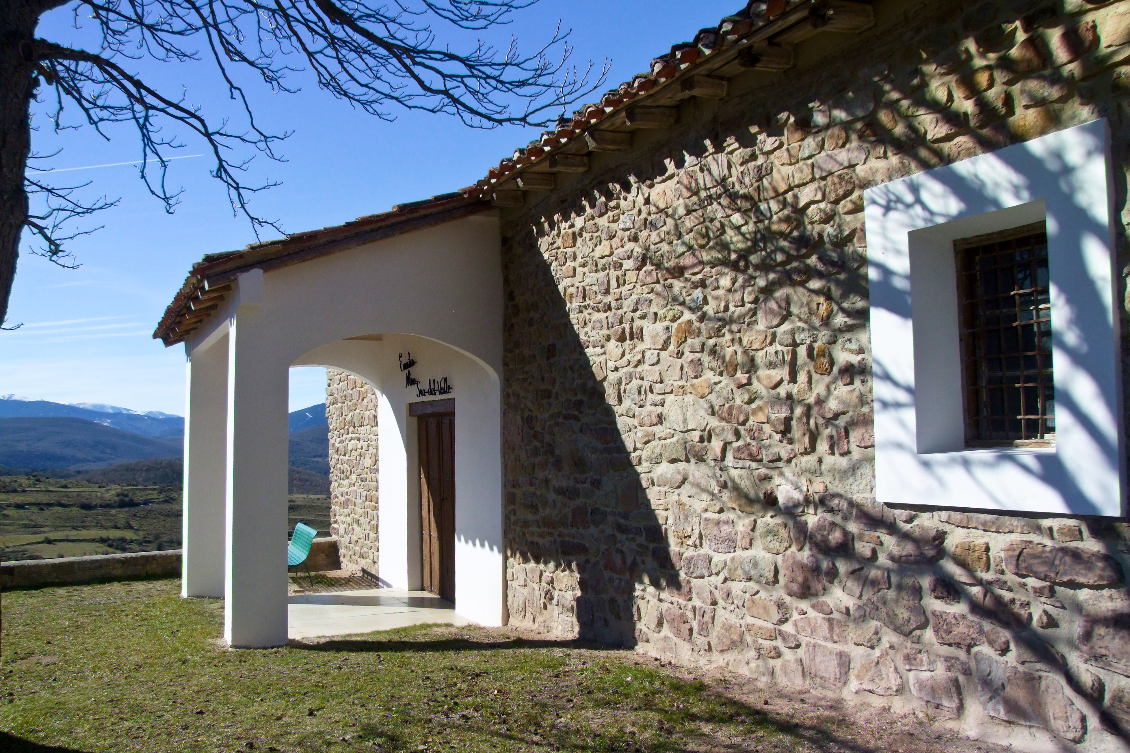 Ermita de la Virgen del Valle en la localidad de Almarza de Cameros, La Rioja - España